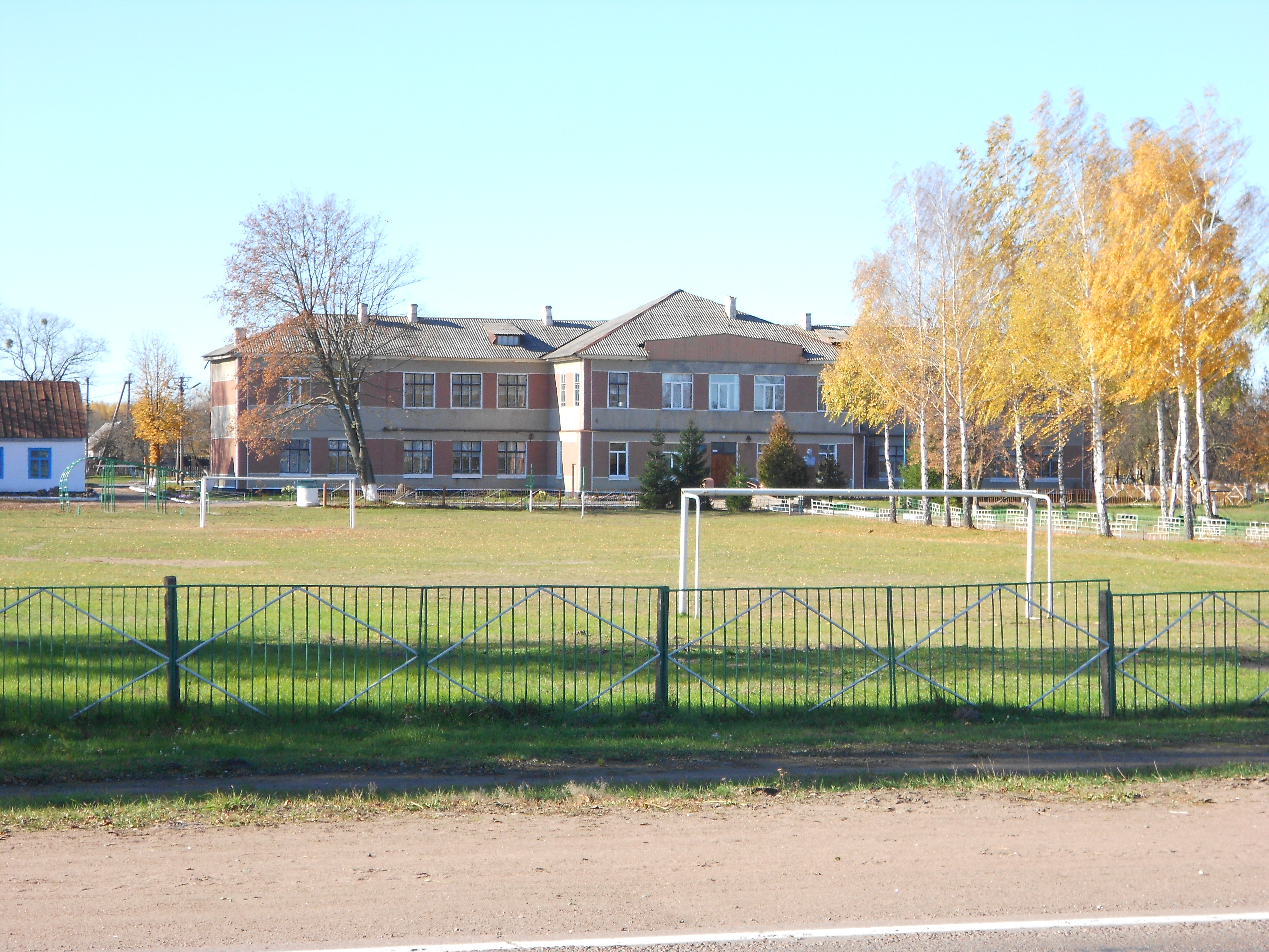 Друга Вікіекспедиція до Коростенського району. Школа у с. Лісівщина, Коростенського району.